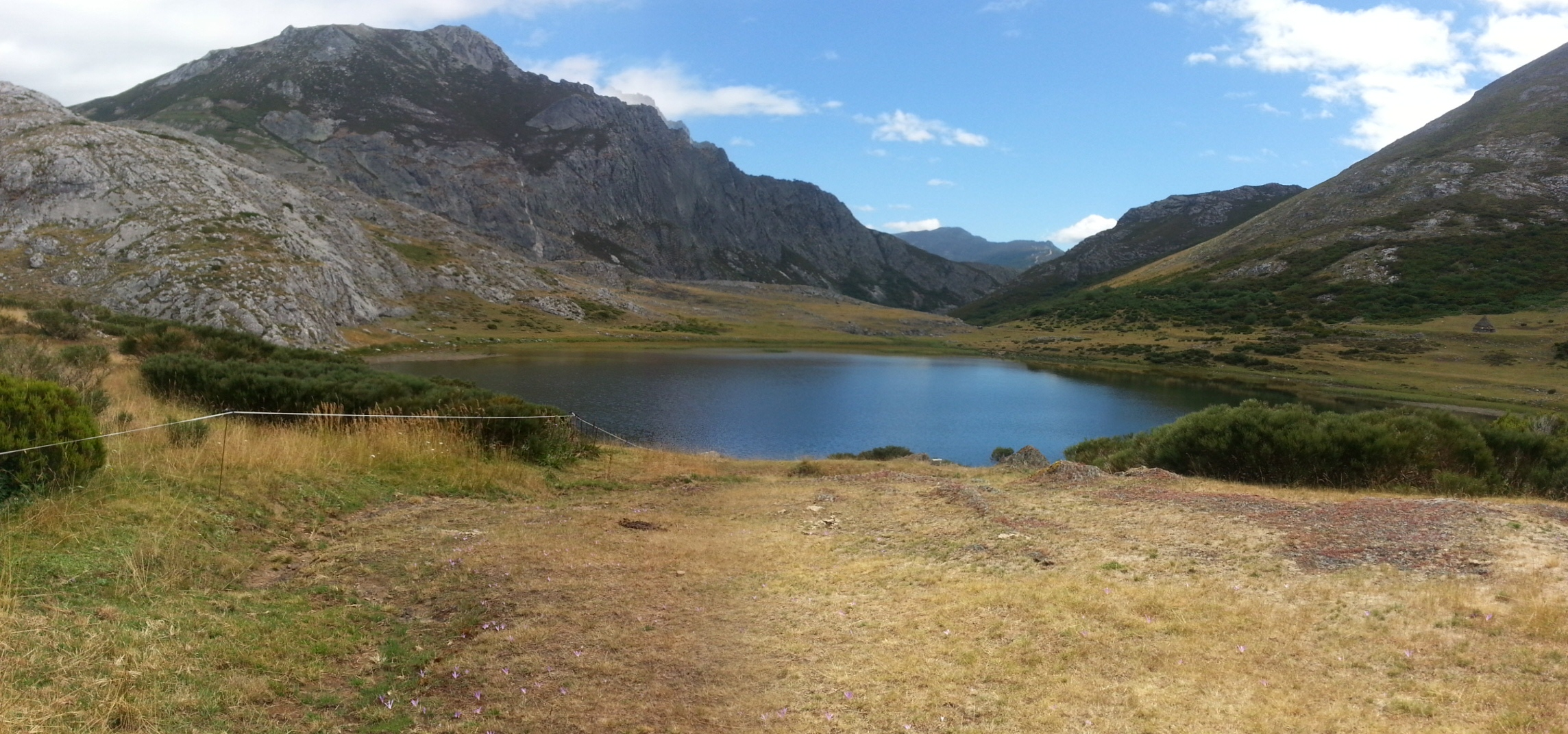 Vista del Lago de Isoba